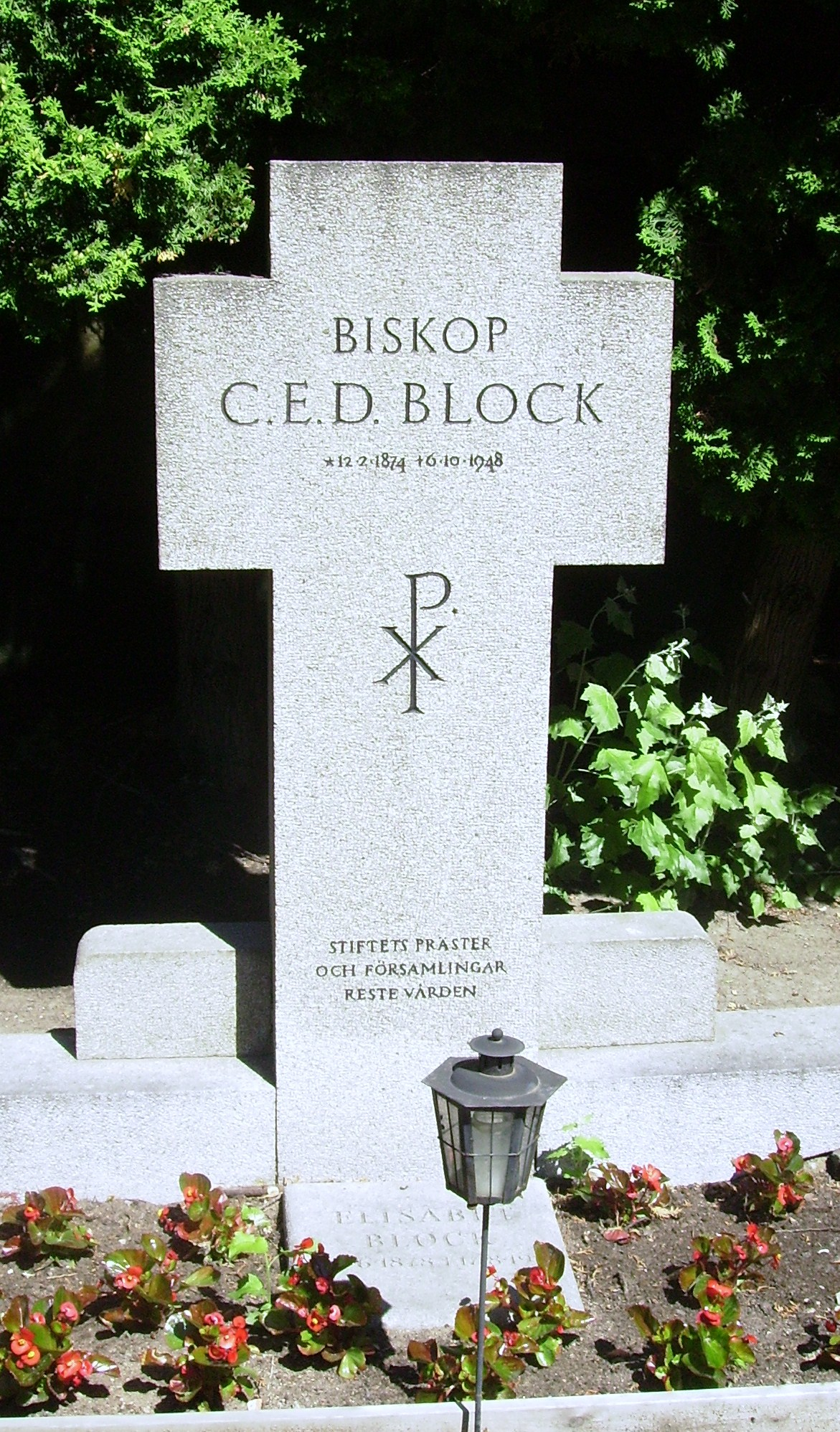 Picture of CED Block's grave at Örgryte gamla kyrkogård in Gothenburg.